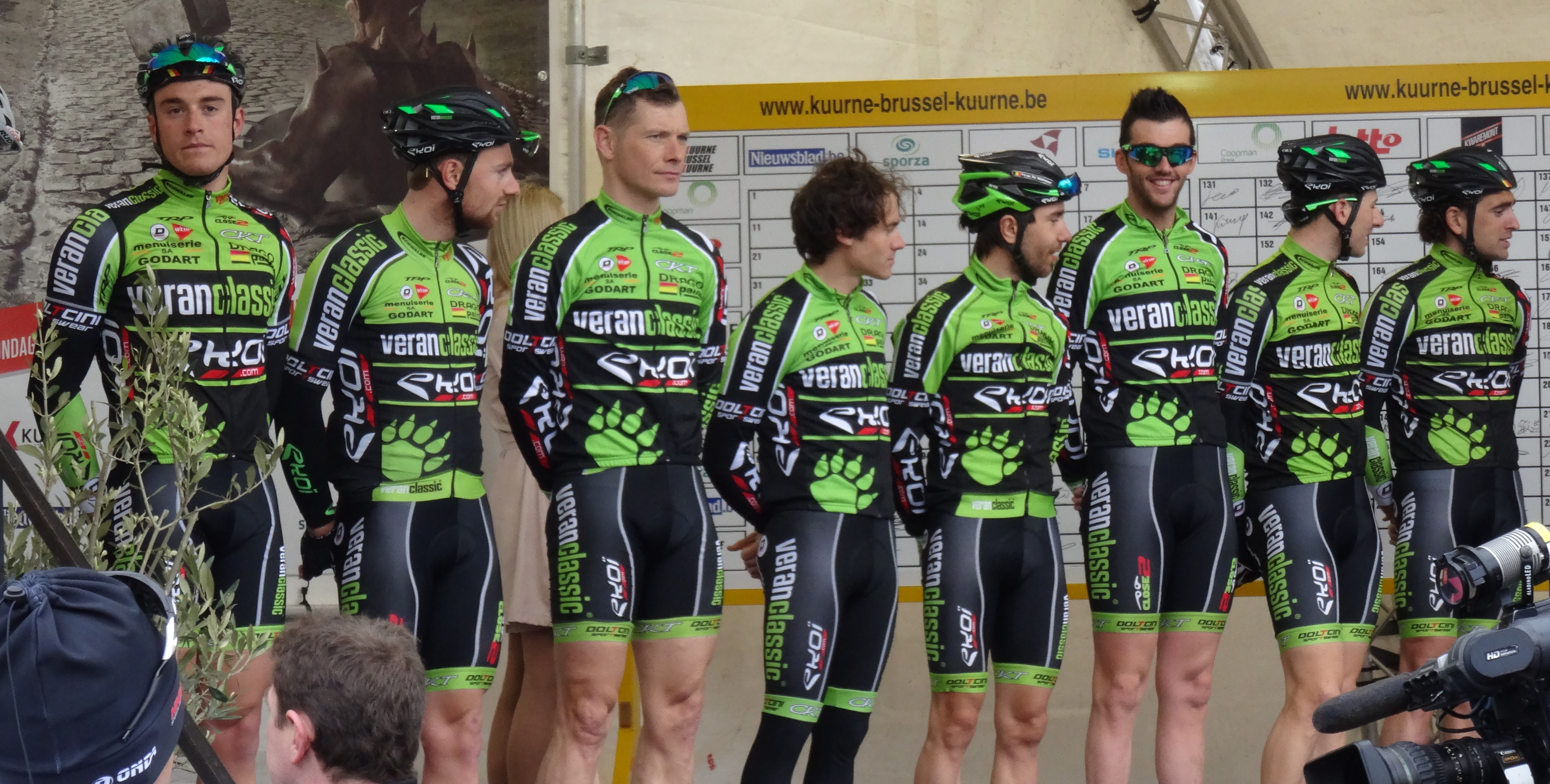 Reportage réalisé le dimanche 1er mars à l'occasion du départ et de l'arrivée de Kuurne-Bruxelles-Kuurne 2015 à Kuurne, Belgique.